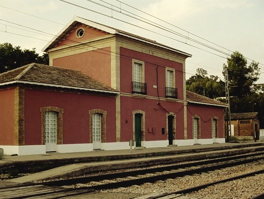 Estación de Hornachuelos, a 7 km en línea recta de la localidad del mismo nombre.